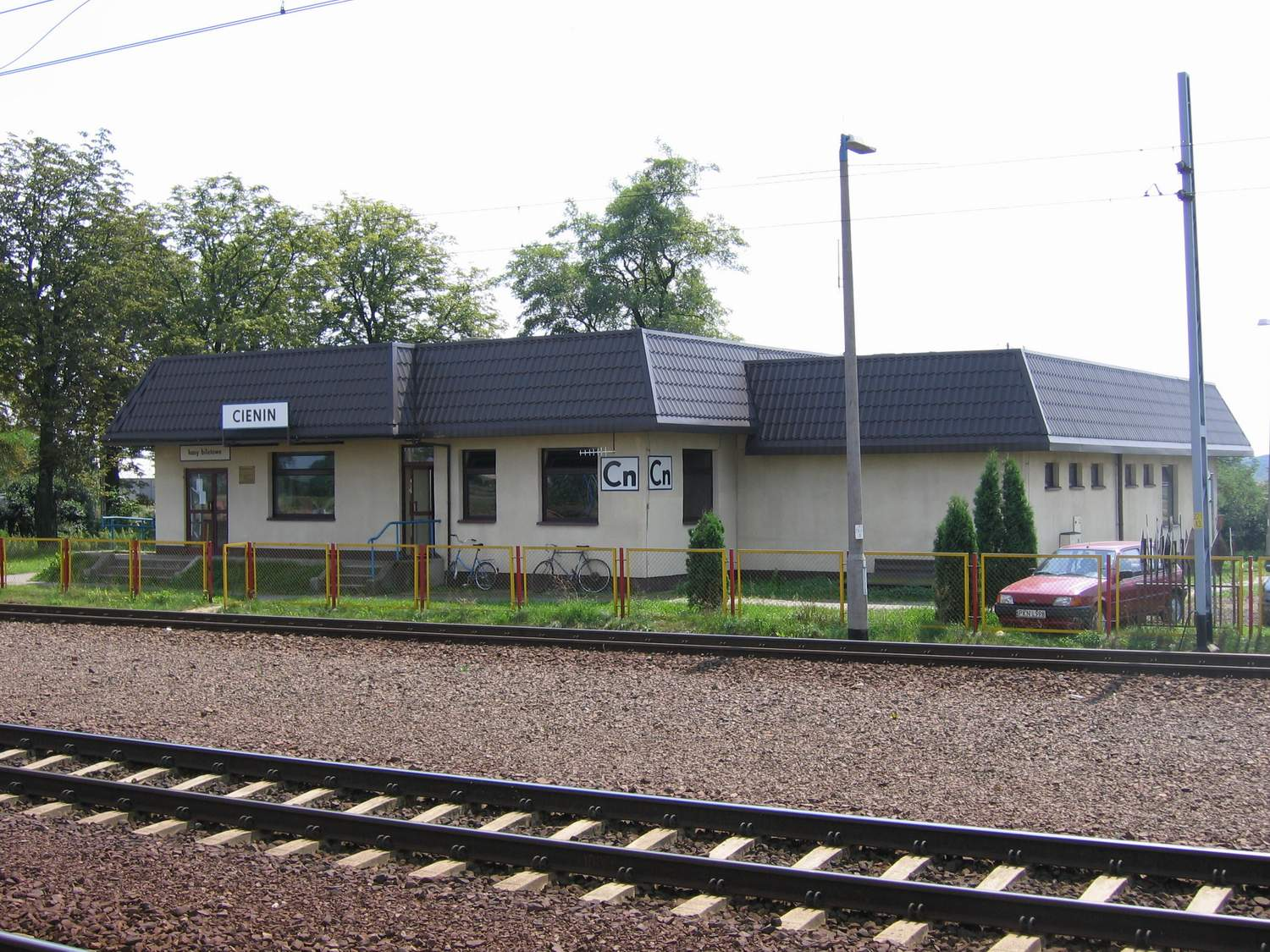 Stacja kolejowa w Cieninie Zabornym